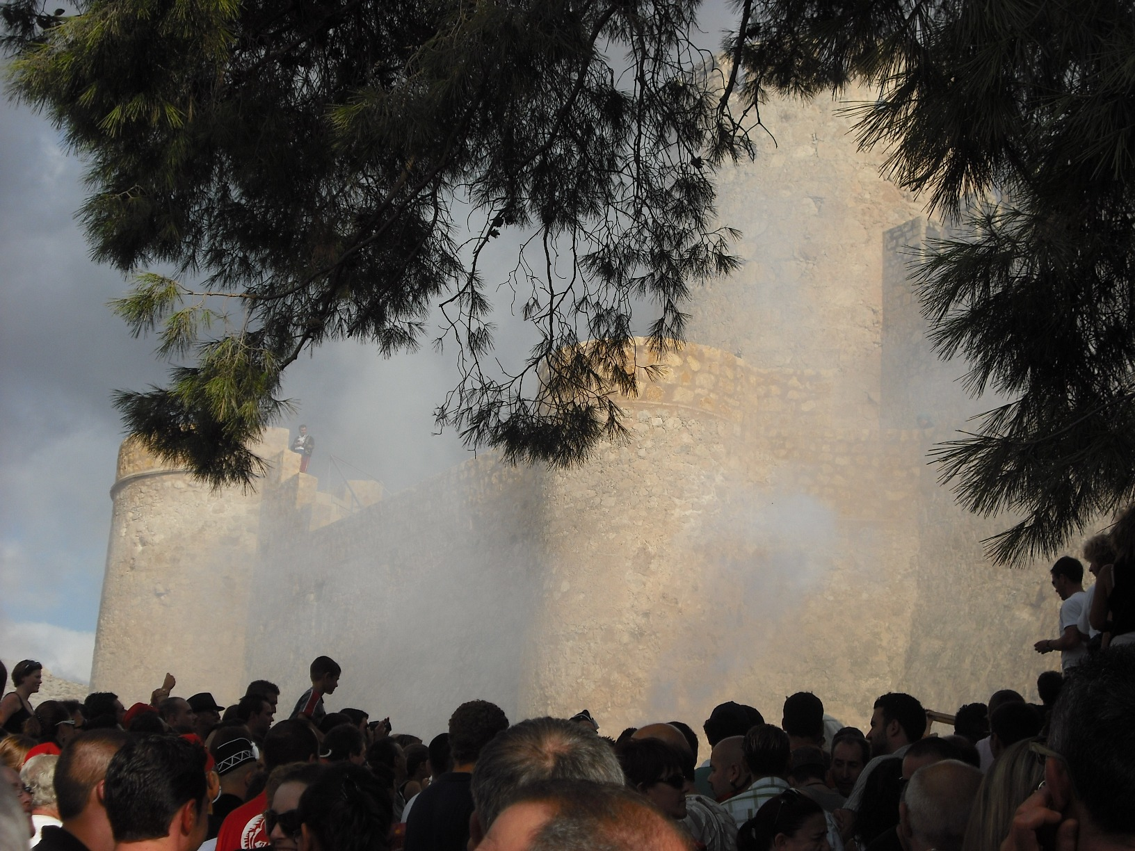 Batalla de la Embajada mora de 2009, con todo el ambiente lleno de pólvora de los arcabuces.